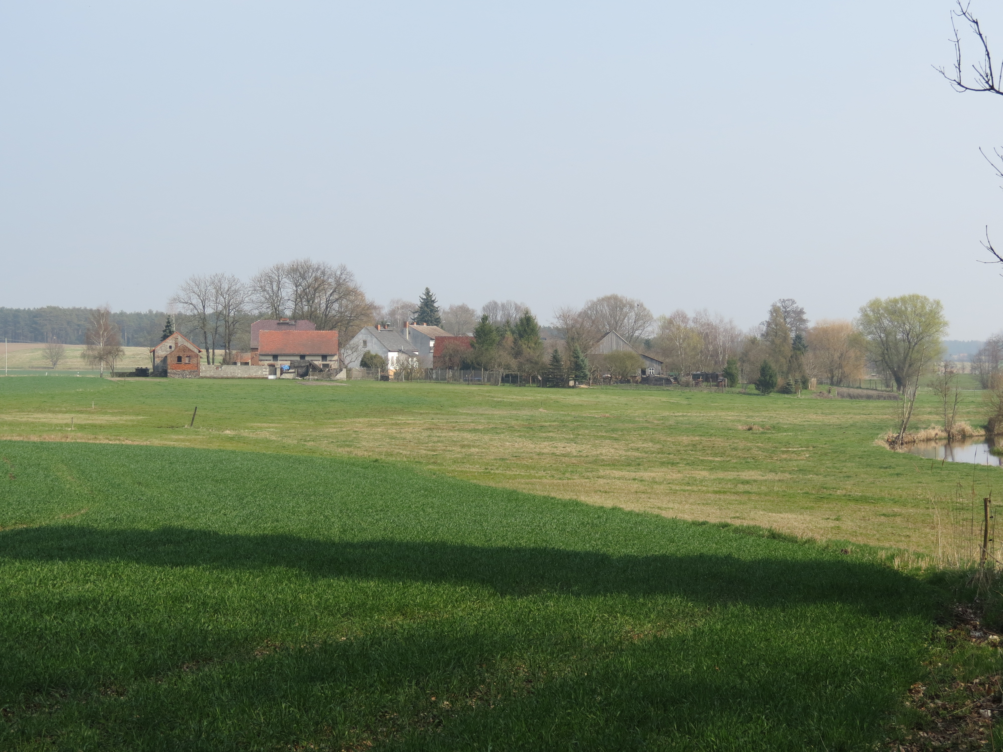 Behlow, Gemeindeteil der Stadt Lieberose, Lkr. Dahme-Spreewald, Brandenburg, Deutschland, von Westen, Nähe sog. "Schlossberg" (= bronzezeitlicher Ringwall")